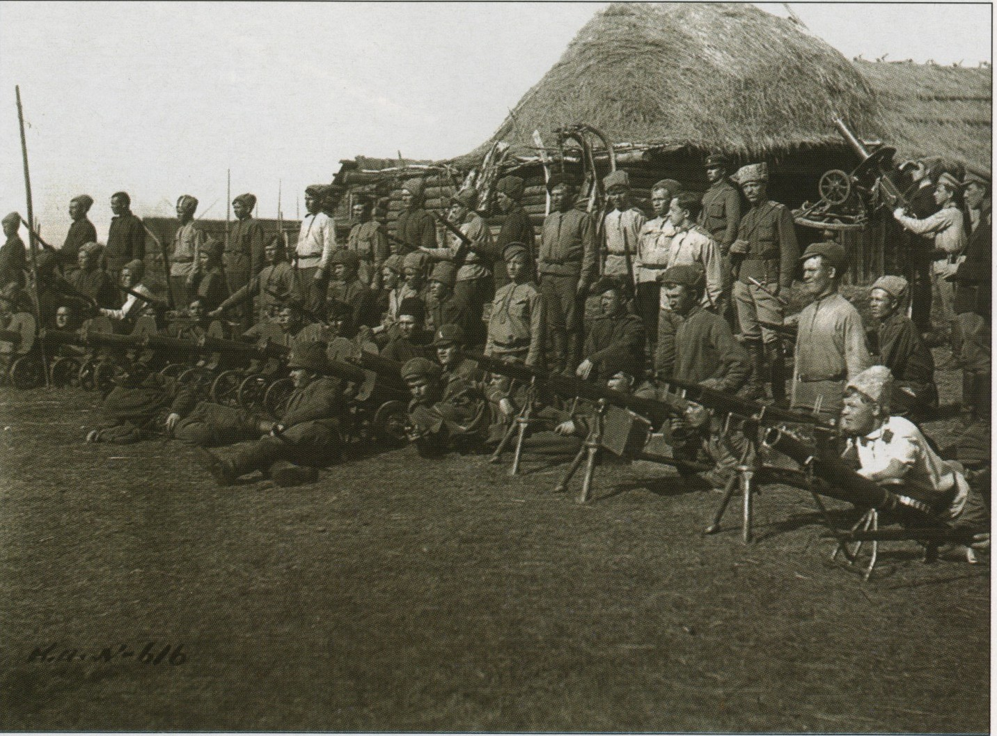 Колчаковские пулеметчики с пулемётами разных систем. Слева направо: максимы, кольты и один льюис